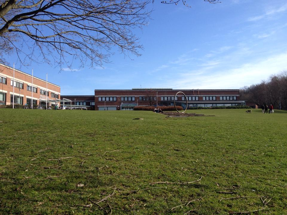 Campus der Humaniora der Universität Göteborg